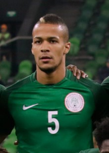 Nigeria national football team